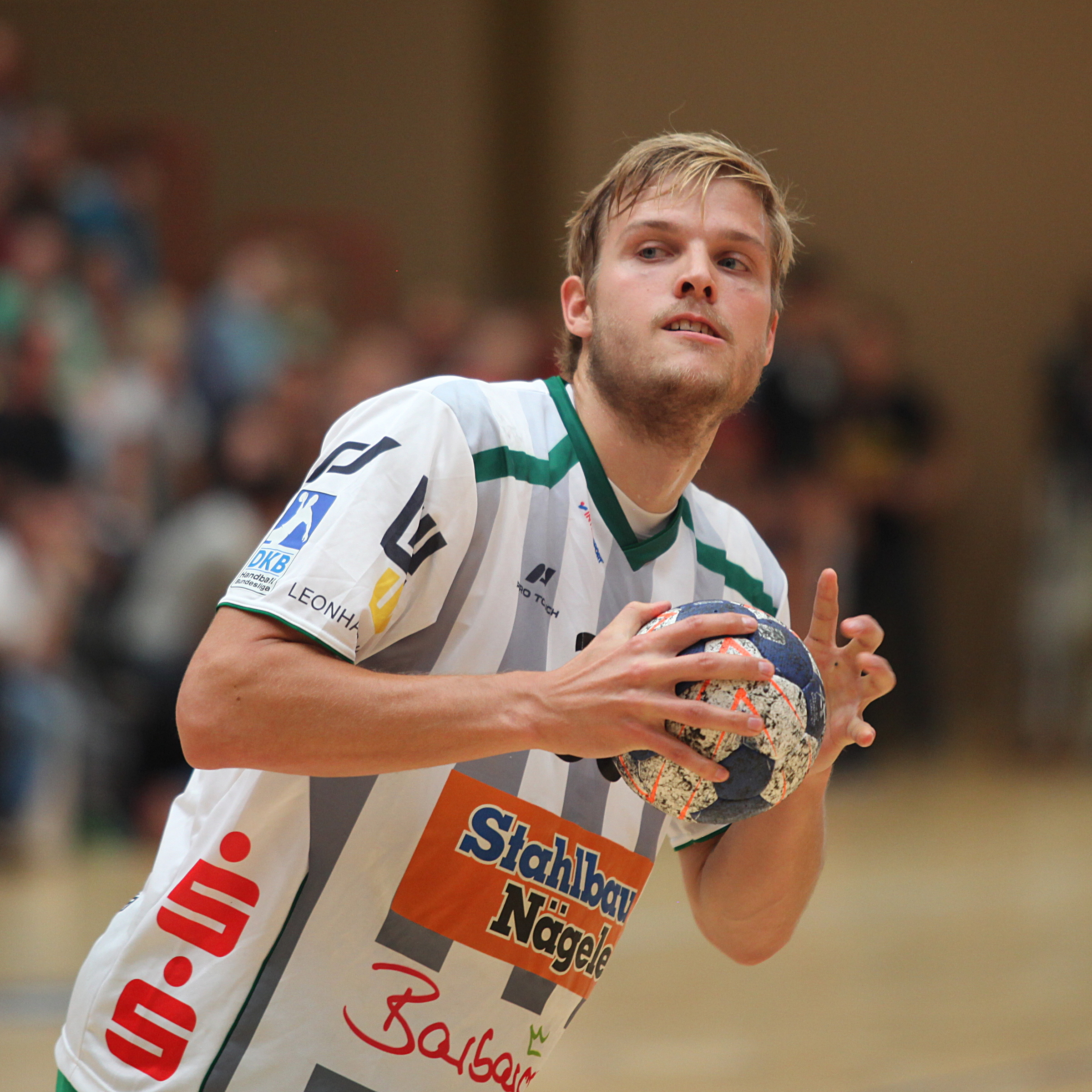 Anton Halén, Handballspieler von Frisch Auf Göppingen am 16. August 2014 beim Sparkassen-Cup in Ehingen.